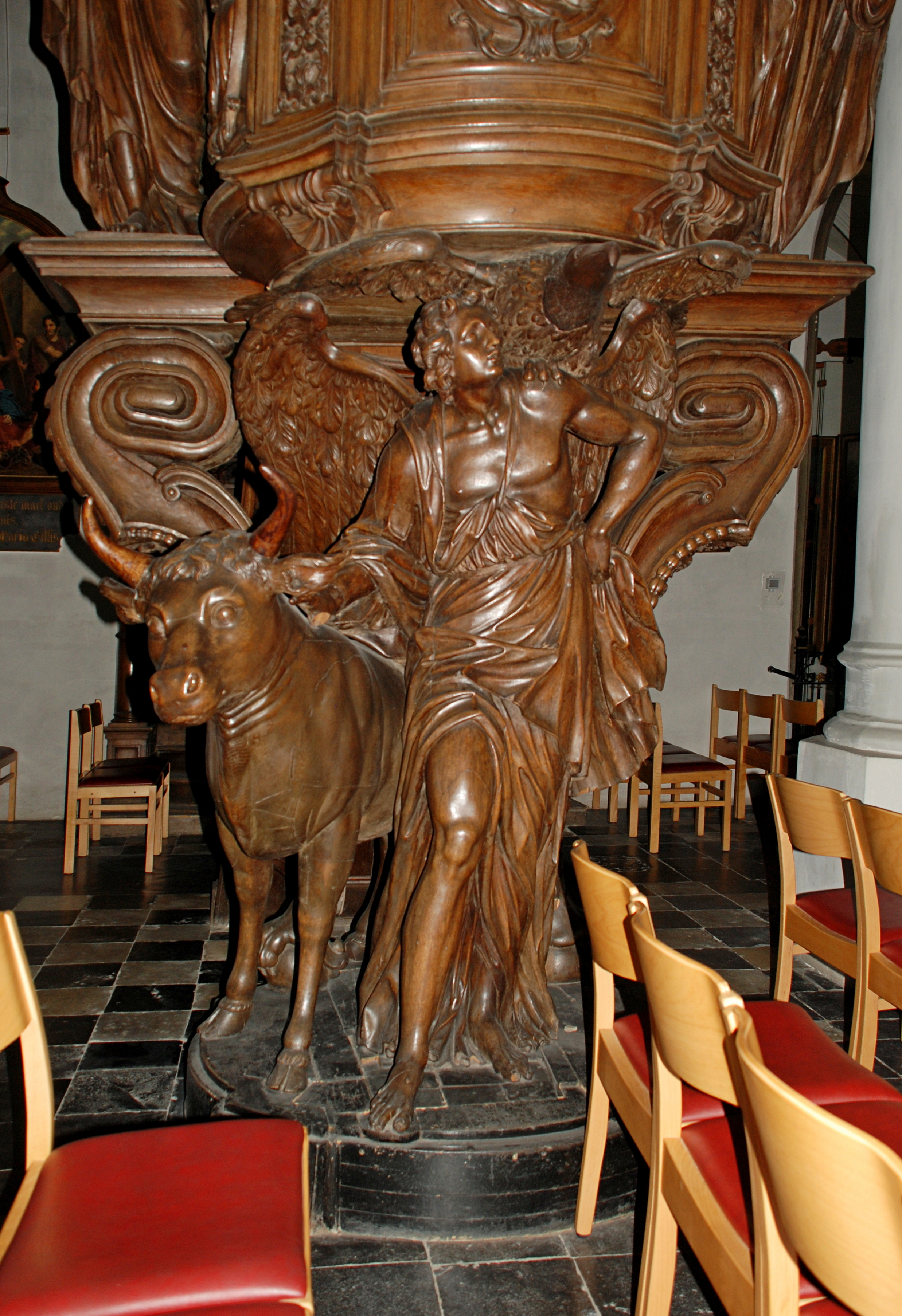 Belgique - Brabant flamand - Asse - Église Saint-Martin